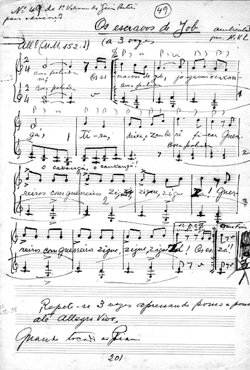 fac simile da partitura original de Villa-Lobos da música Escravos de Job, disponibilizada pelo Museu Villa-Lobos.